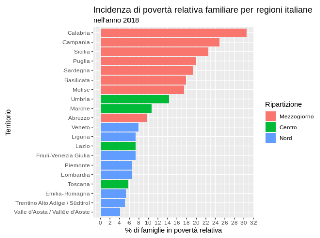 file realizzato con RStudio con dati istat